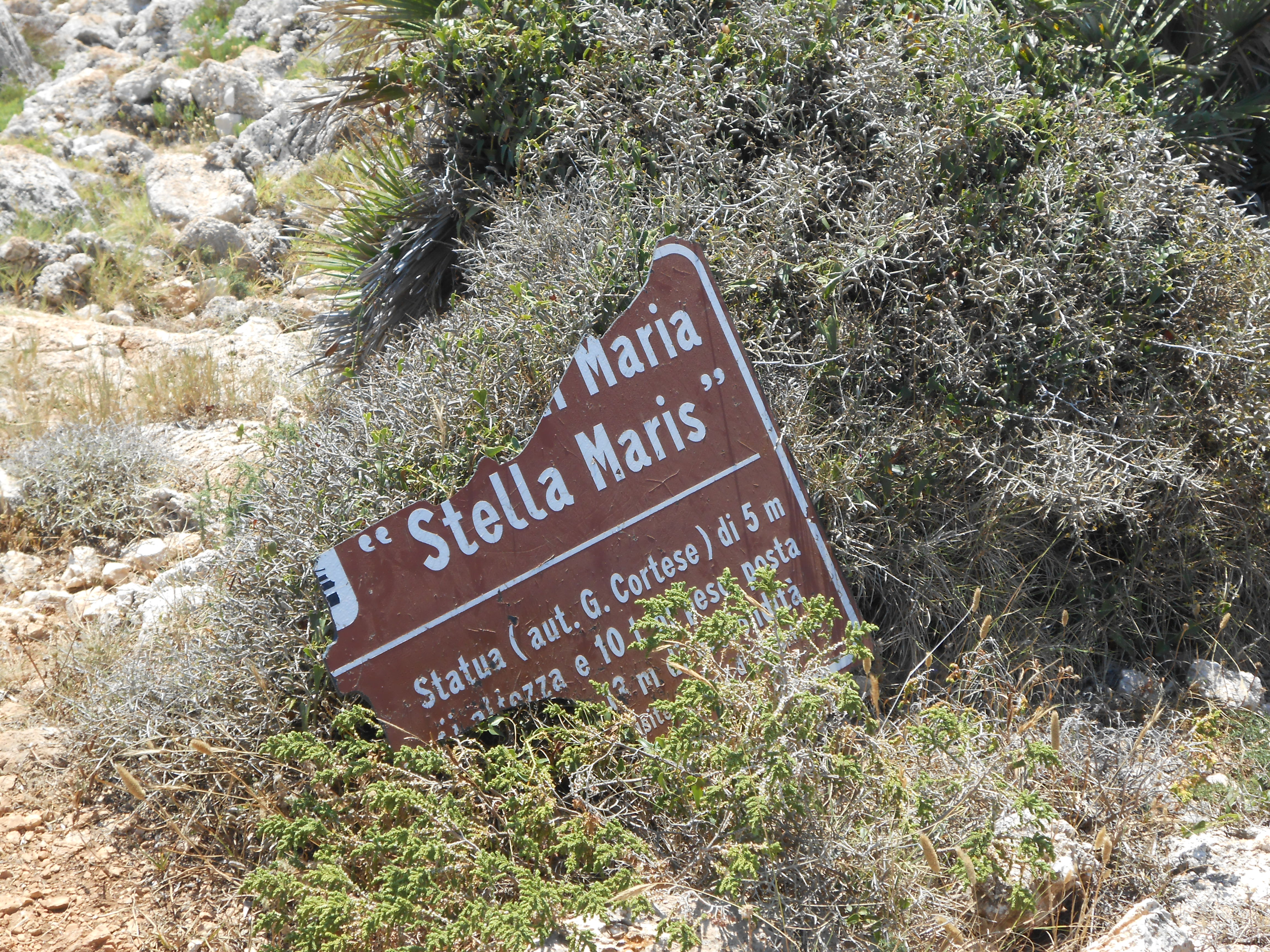 Stella Maris: scultura marina a Custonaci. Quello che rimane del cartello segnaletico